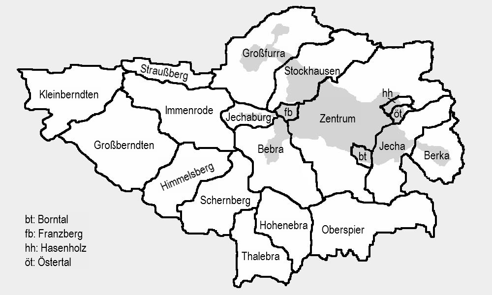 Die Lage der Stadt- und Ortsteile der Kreisstadt Sondershausen (Thüringen).